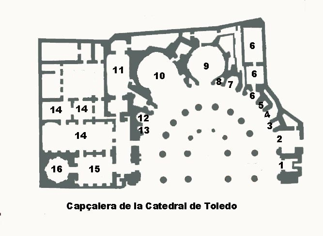 Plànol de la capçalera de la catedral de Toledo.Spain